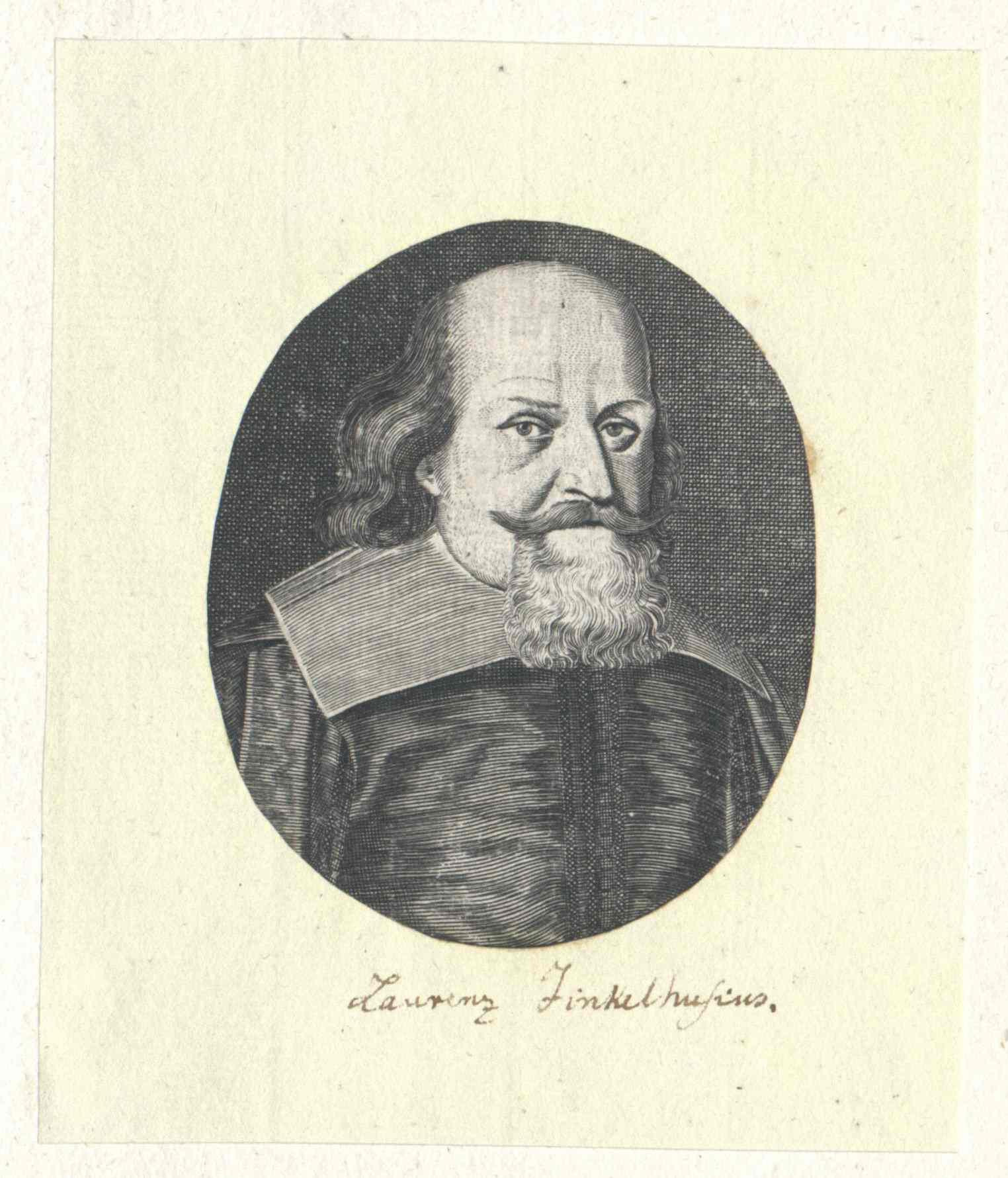 Porträt des Lübecker Syndicus Laurentius Finckelthaus (Finckelthusius). Österreichische Nationalbibliothek Wien, Bildarchiv und Grafiksammlung, Porträtsammlung, Inventar-Nr. PORT_00143850_01